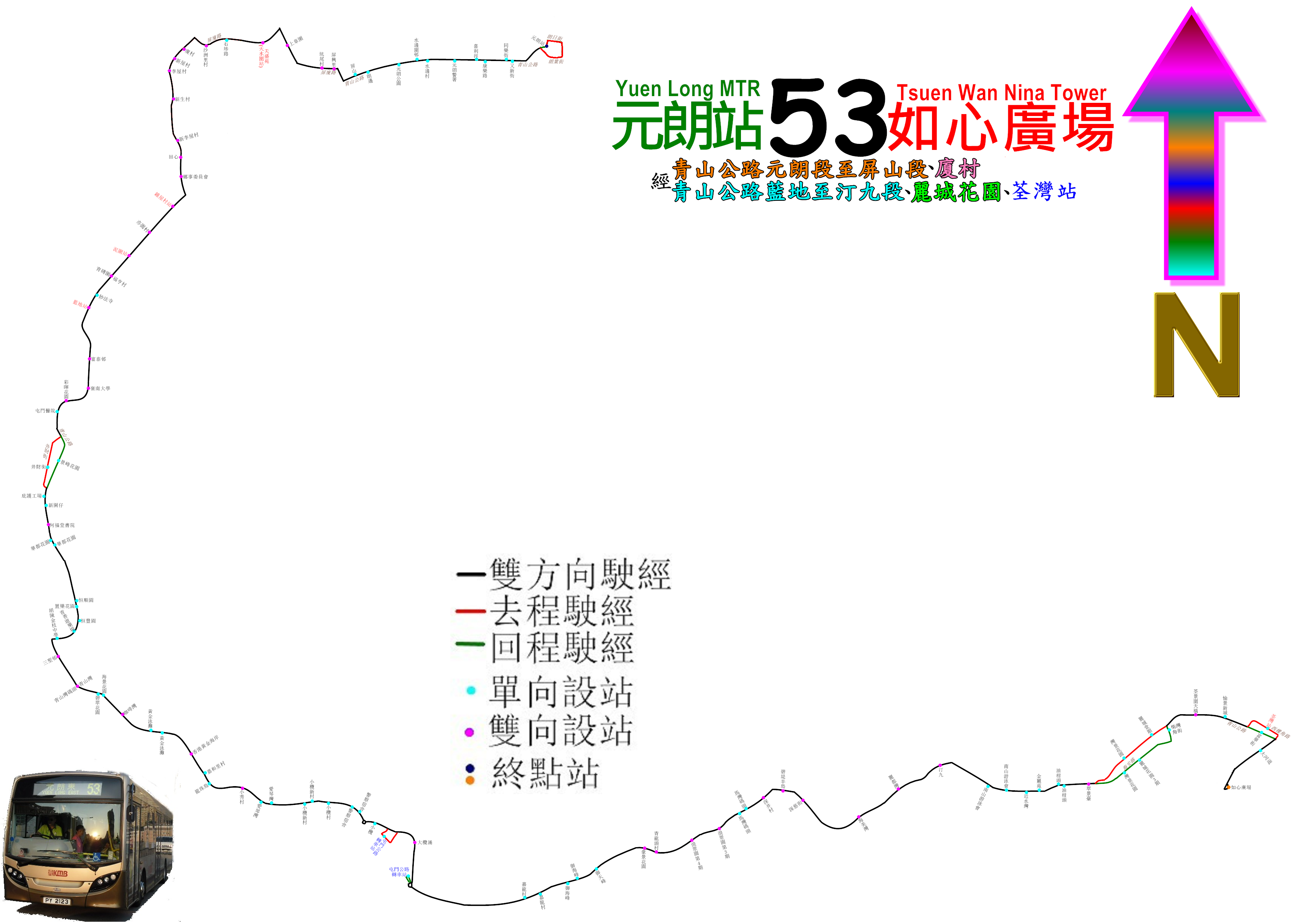 中文（香港）: 九巴53線的走線圖